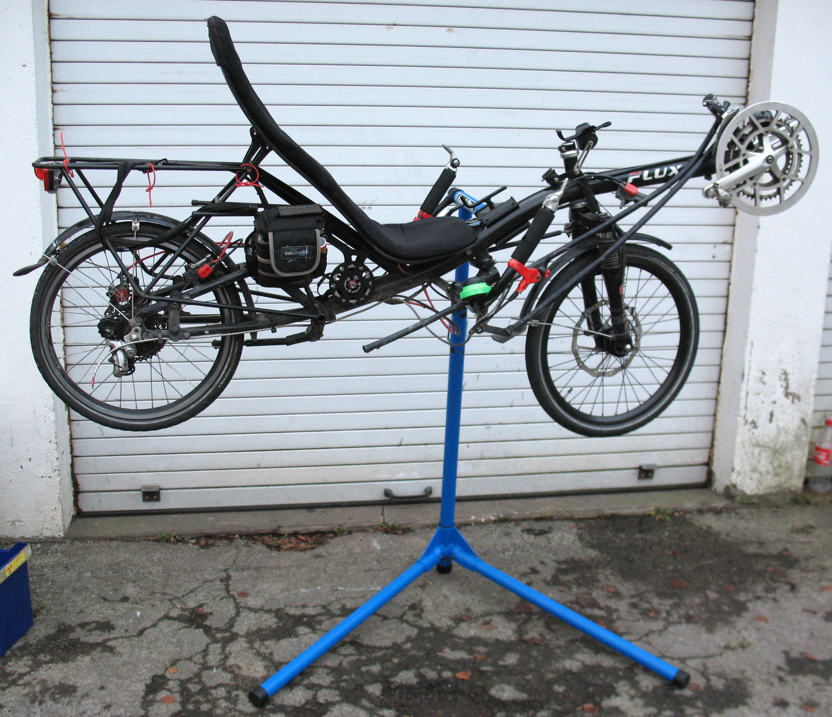 Fahrrad-Montageständer Tacx T3075 mit Liegerad